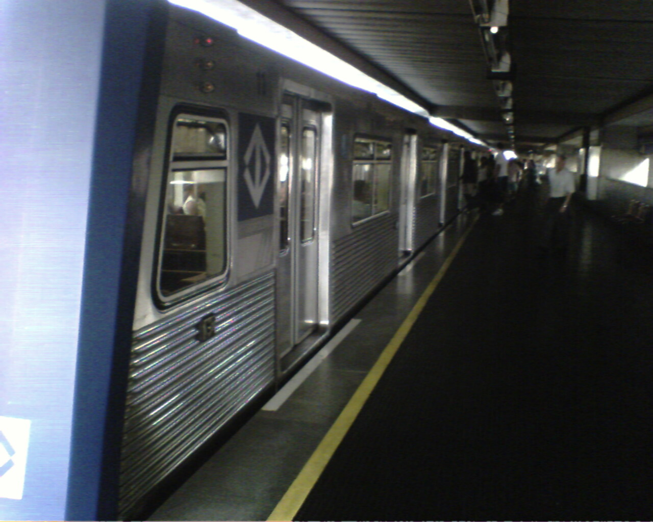 São Paulo's Metro Train at Tietê Station - São Paulo - Brazil